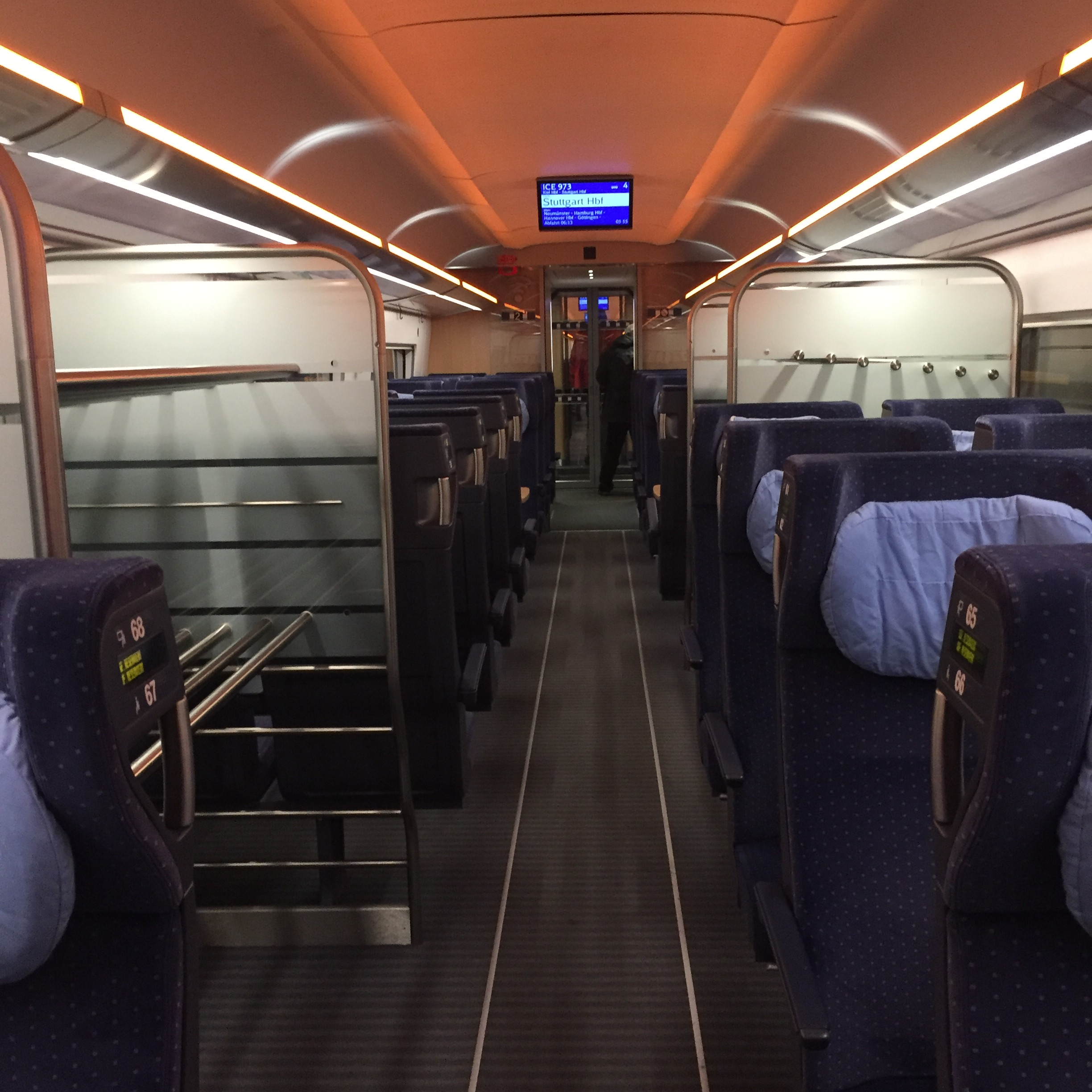 Innenraum Großraum ICE 4 2. Klasse